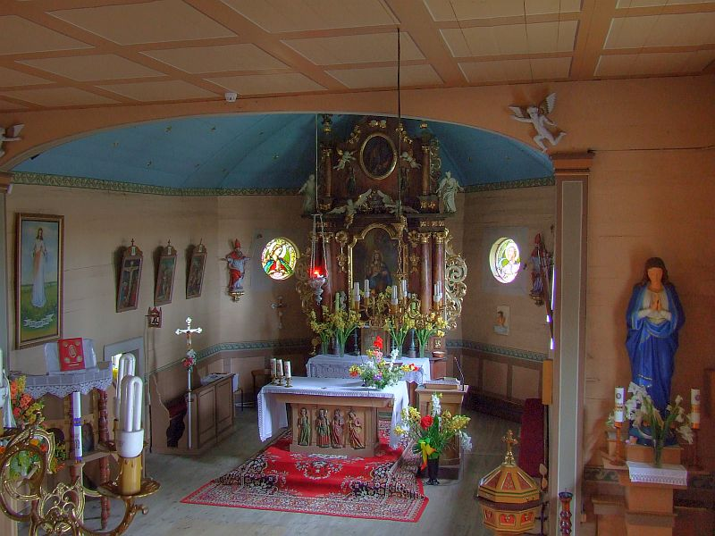 Wnętrze kościoła pw. Św.Jadwigi w Biskupicach k. Olesna (gmina Radłów, powiat Olesno). Widok z chóru na ołtarz.